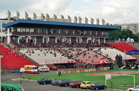 Stadion Miejski